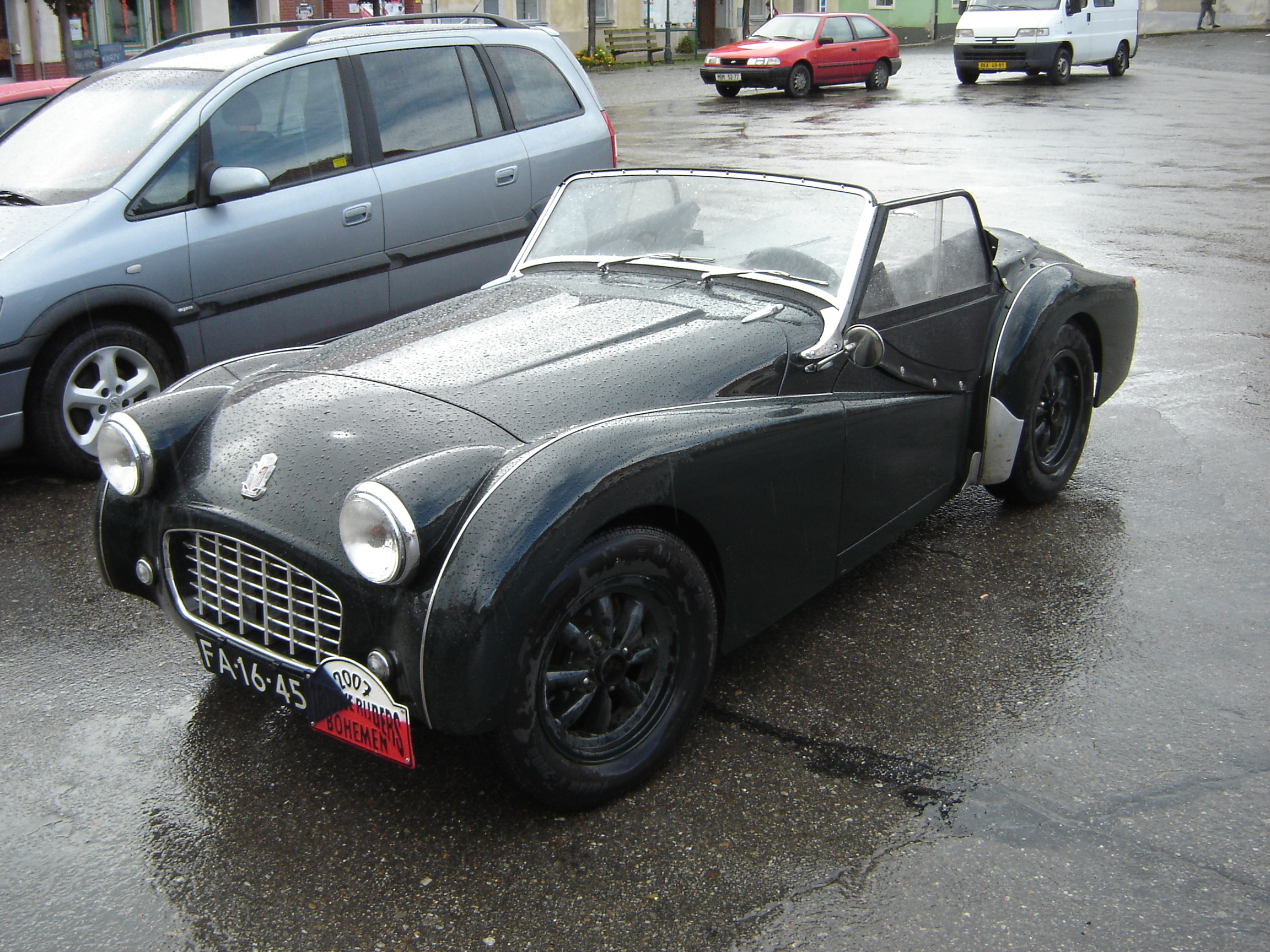 Triumph TR3